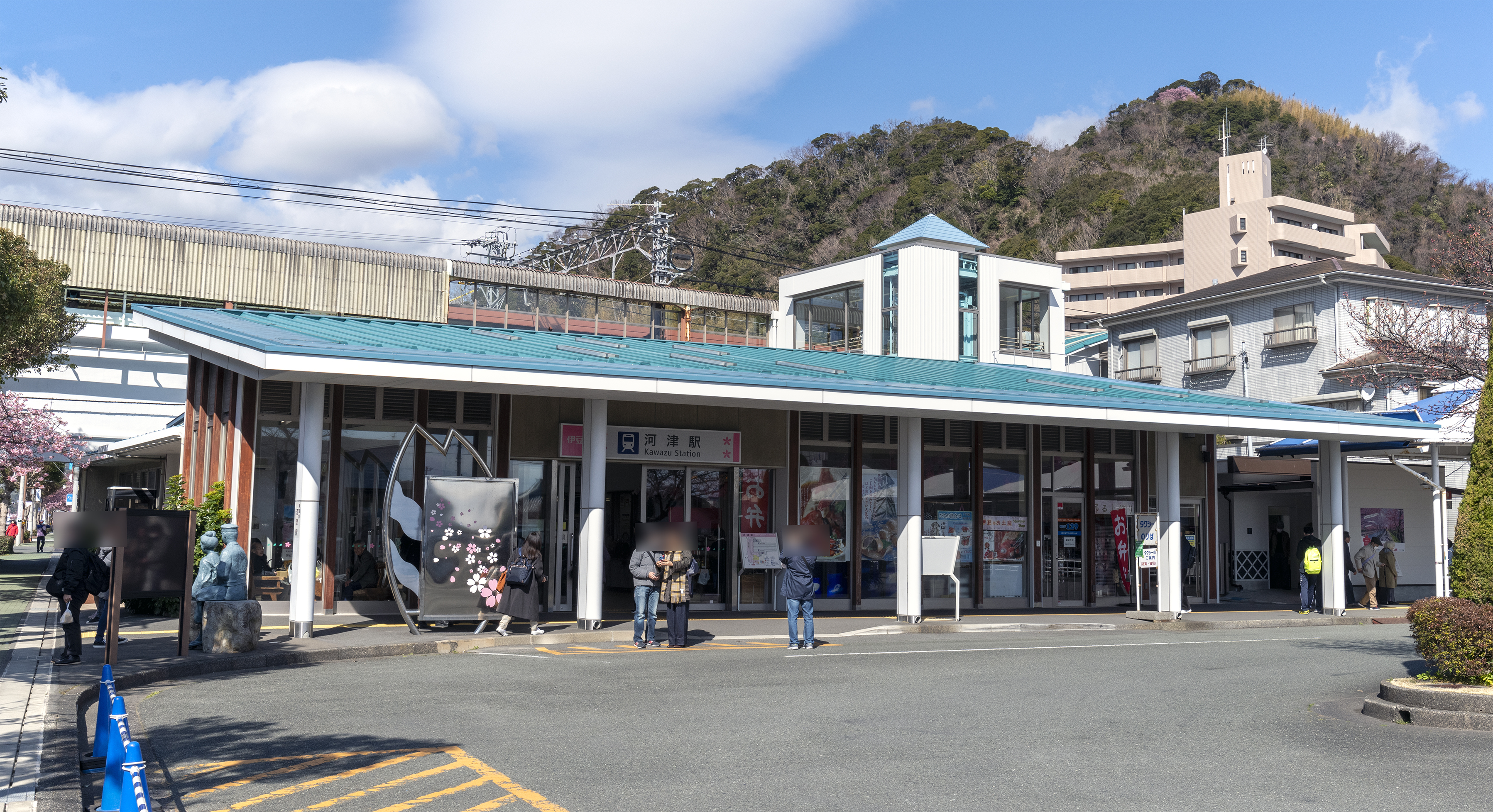 伊豆急行株式会社伊豆急行線河津駅駅舎正面